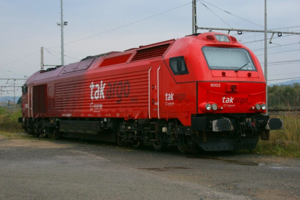 El dia d'ahir va ser un dia molt profitós, buscant en la classificació de Constantí, per veure si estaven les cisternes del benzè que va a la refineria de Repsol ubicada en El Morell, em vaig trobar aquesta preciositat. La 6002 a Constantí, esperant per realitzar el servei Constantí - Entroncamento, un moment molt anhelat.